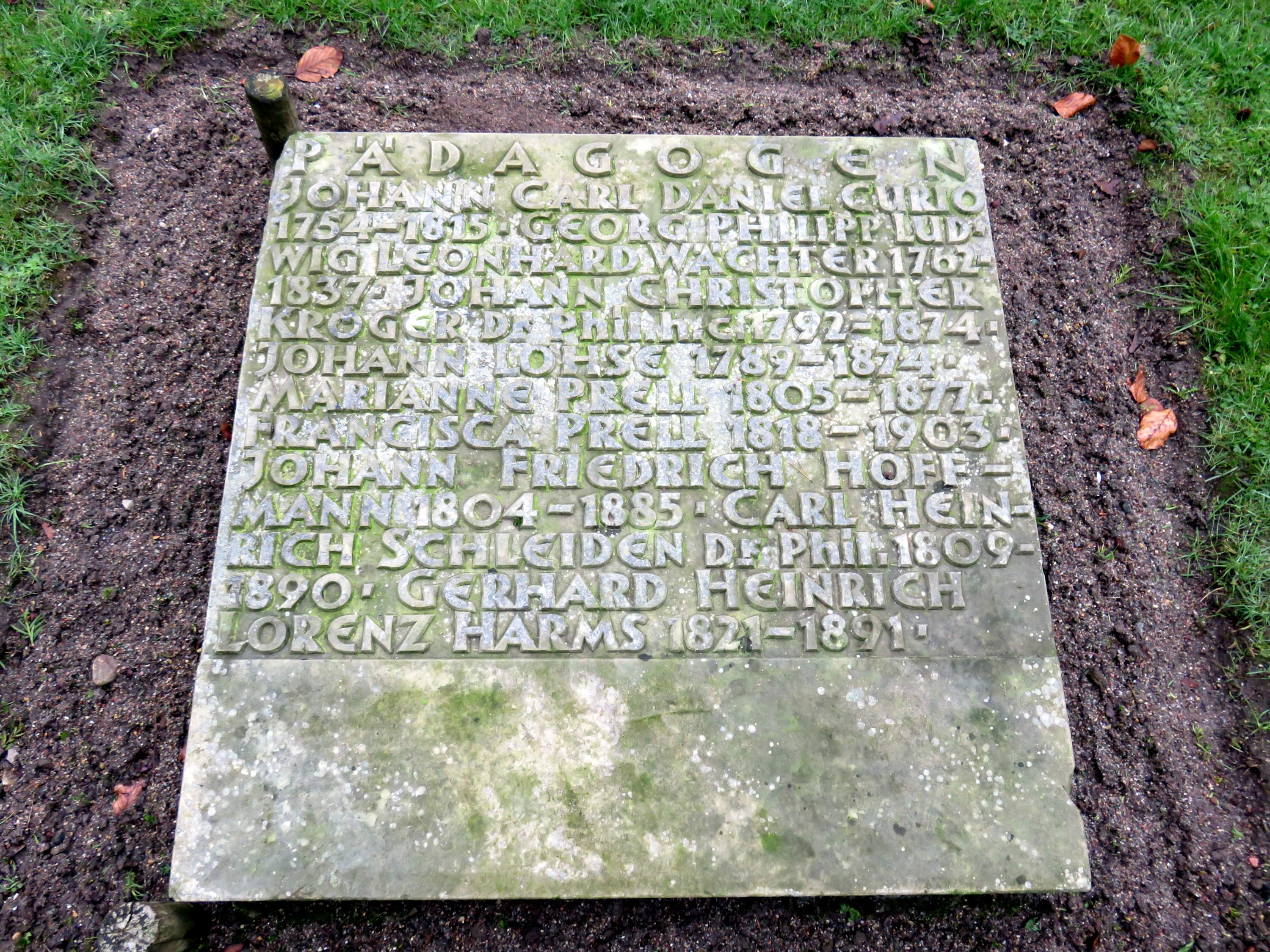 Sammelgrabmal Pädagogen im Bereich des Althamburgischen Gedächtnisfriedhofs auf dem Hamburger Friedhof Ohlsdorf, südöstliche Querachse, zu Ehren von unter anderen Johann Carl Daniel Curio, Johann Christopher Kröger, Carl Heinrich Schleiden.